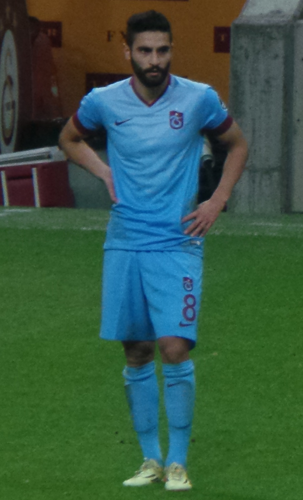 Mehmet Ekici